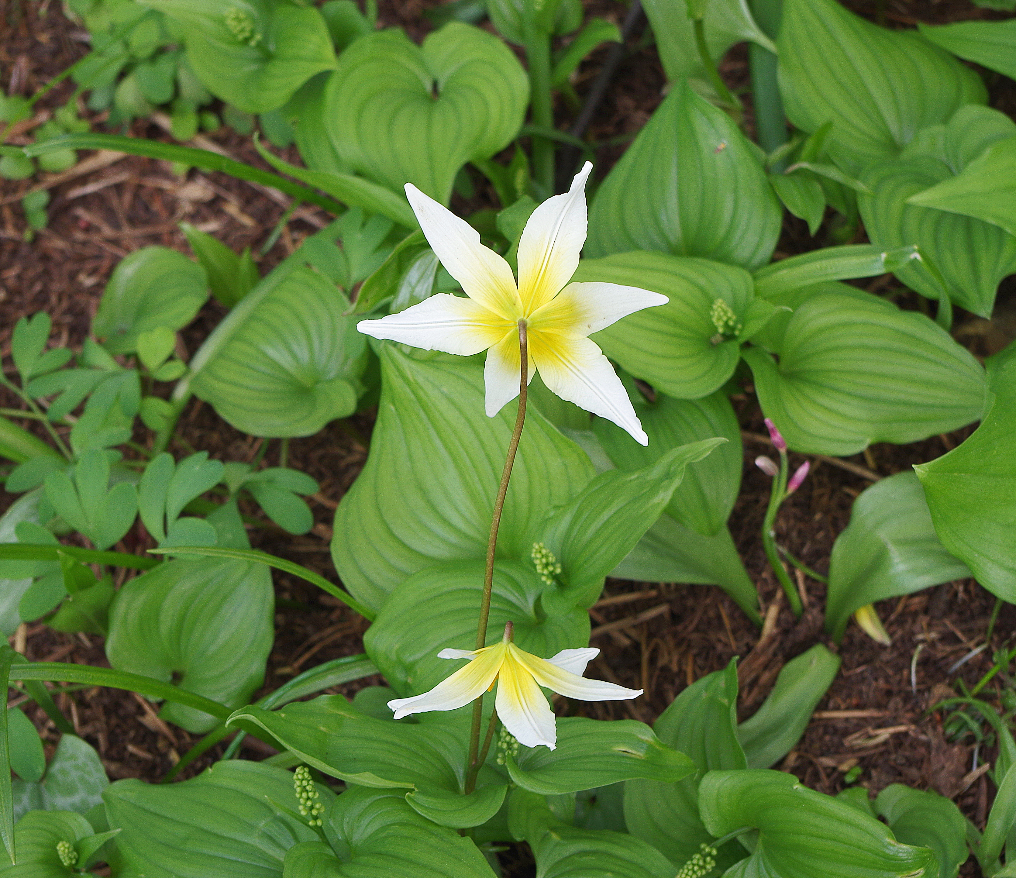 Erythronium helenae - Kew Gardens